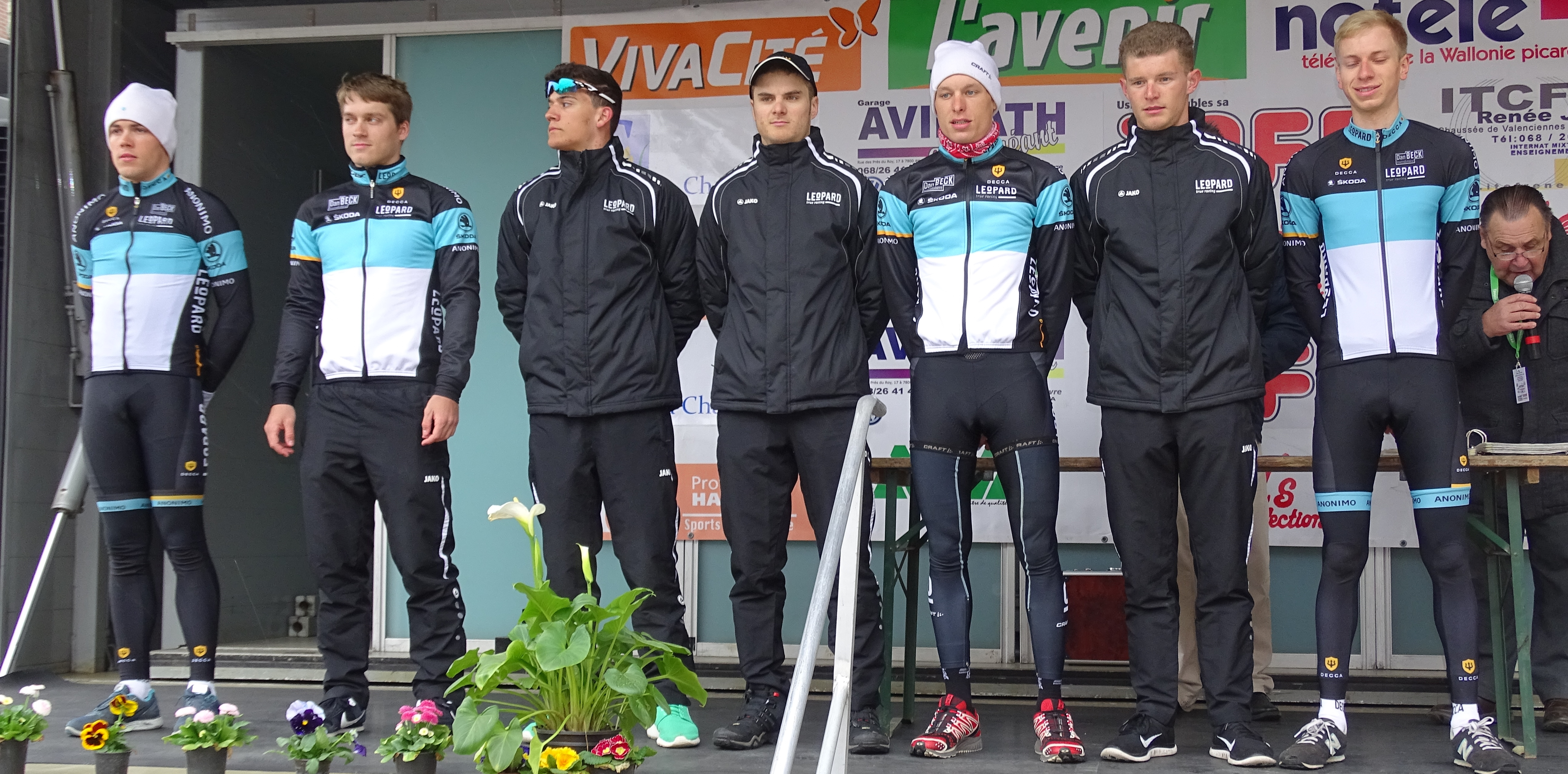 Triptyque des Monts et Châteaux 2015 Depicted team: Leopard Development